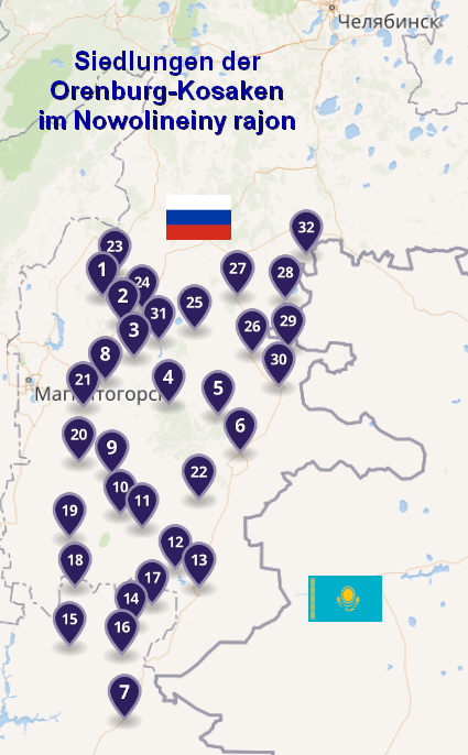 Lage der Posten im Nowolineiny rajon